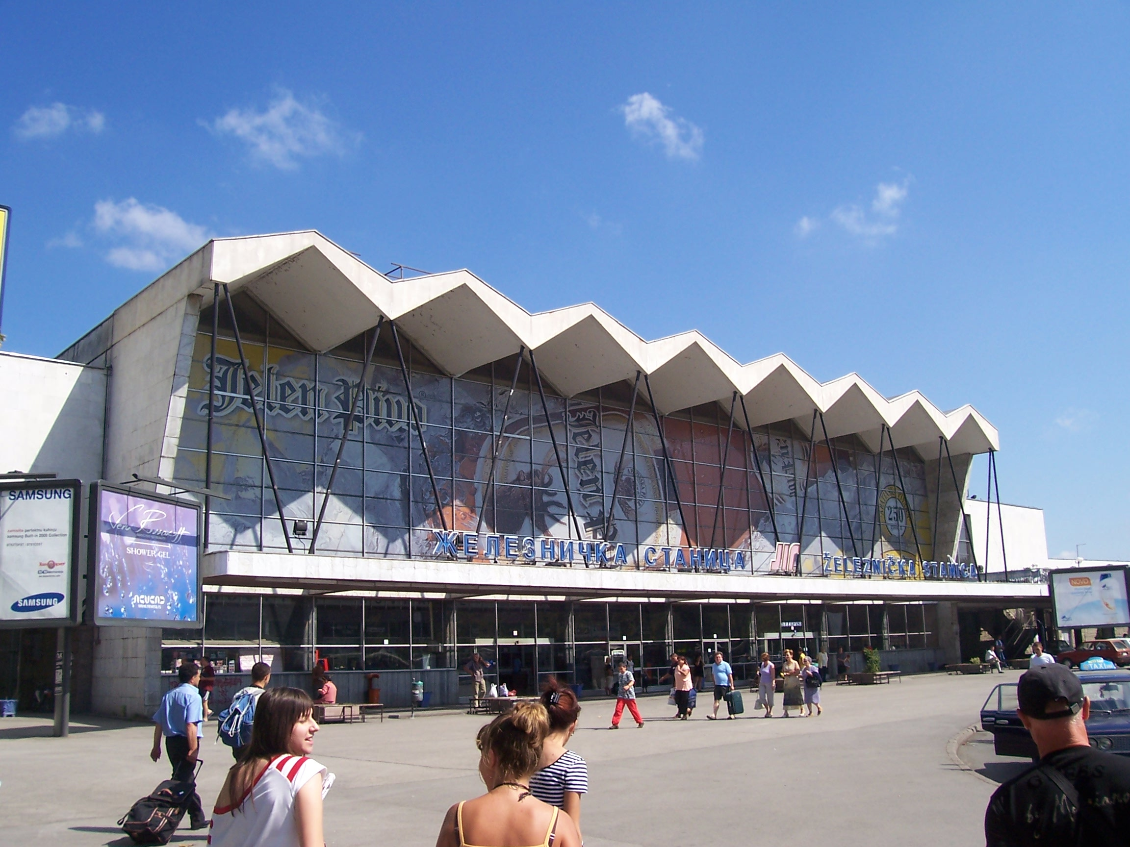 Сербия, вокзал железнодорожной станции города Нови-Сад